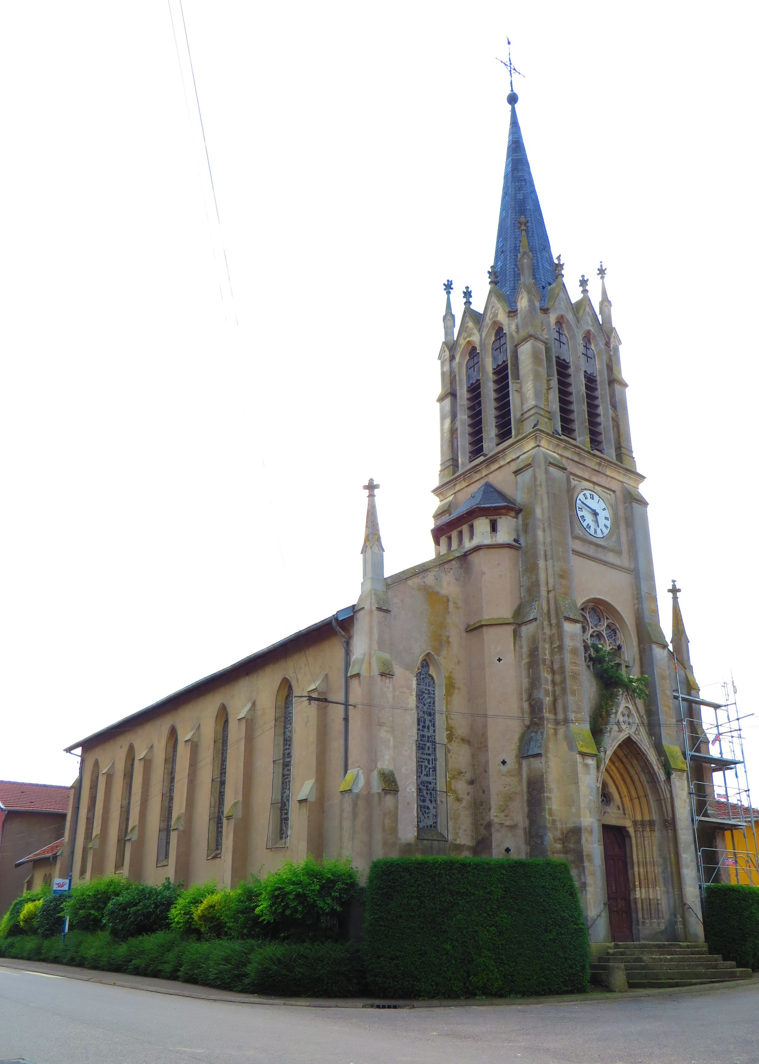 Armaucourt Église Saint-Paul